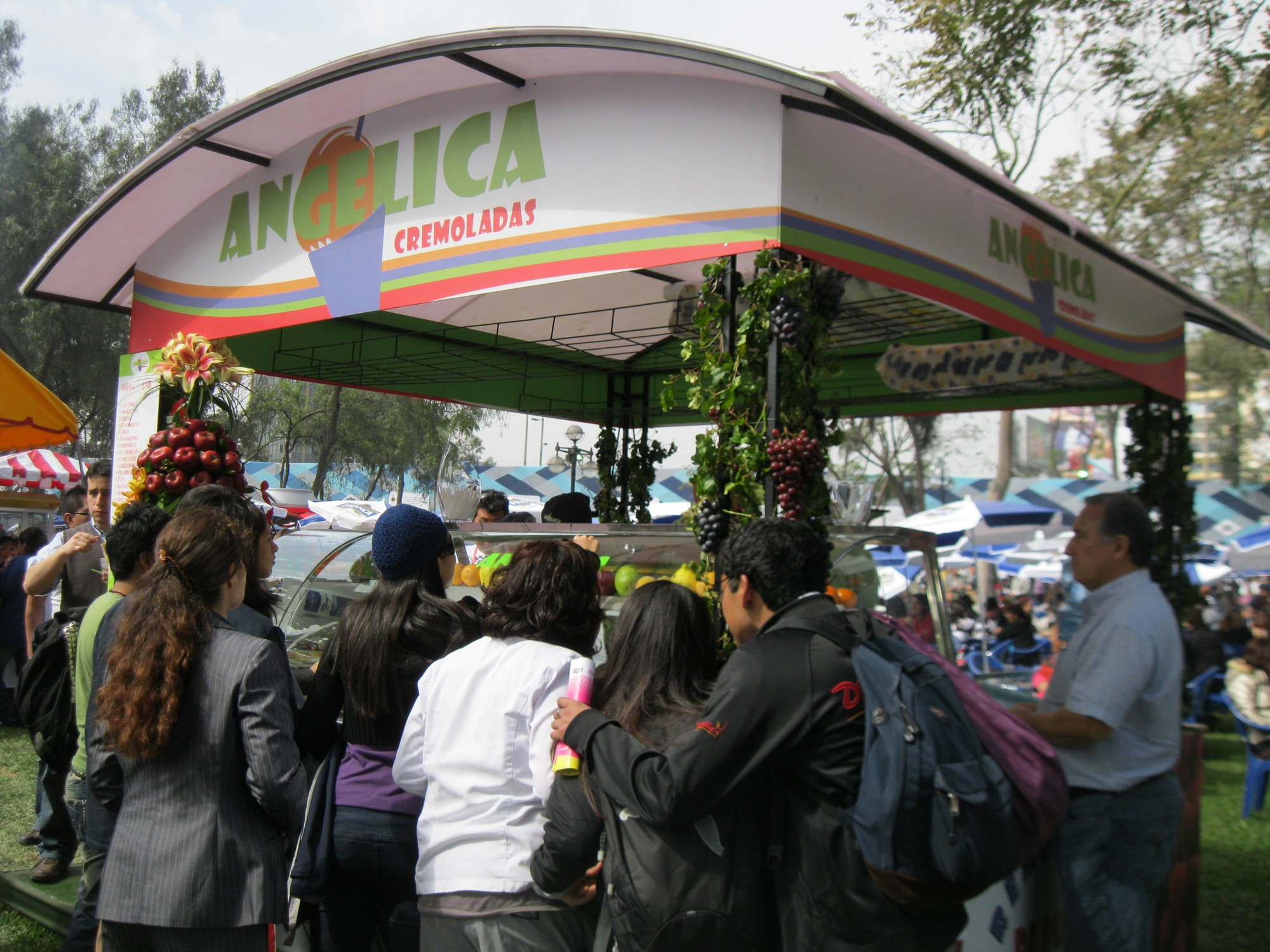 Angélica